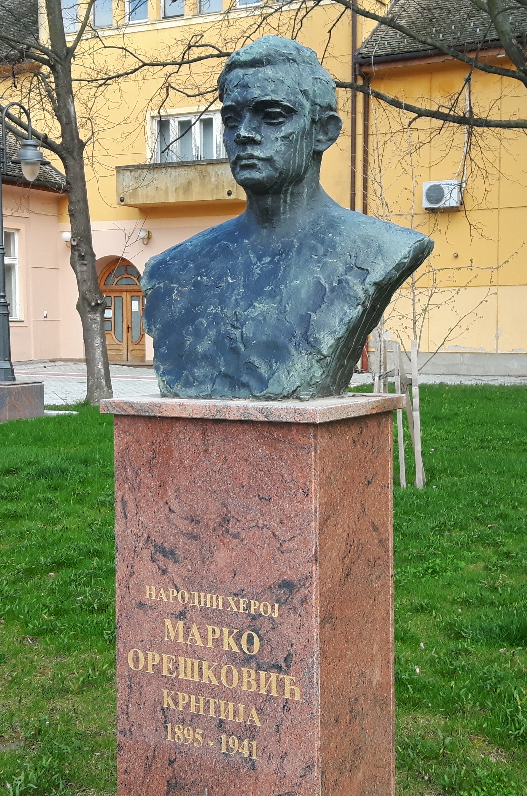 Исчена фотографија коју је послао Корисник:Plamen.